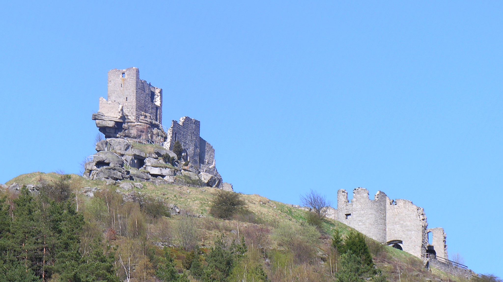 Burg Flossenbürg erbaut ab 12. Jahrhundert durch Graf Berengar von Sulzbach - in Folge diverse Besitzer - Flossenbürg Oberpfalz Bayern - Foto Wolfgang Pehlemann DSCN7754